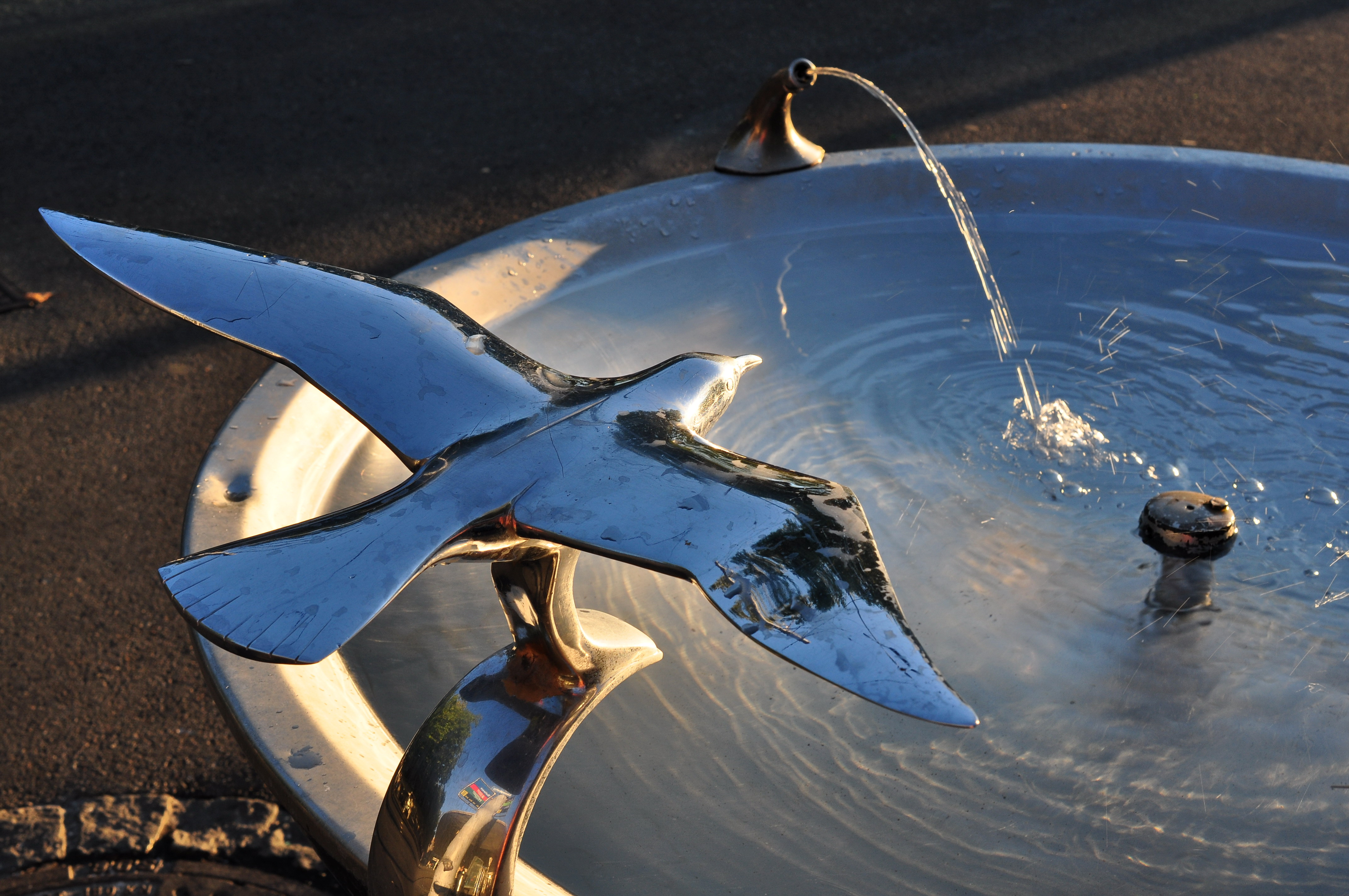 Bellevue in Zürich (Switzerland)